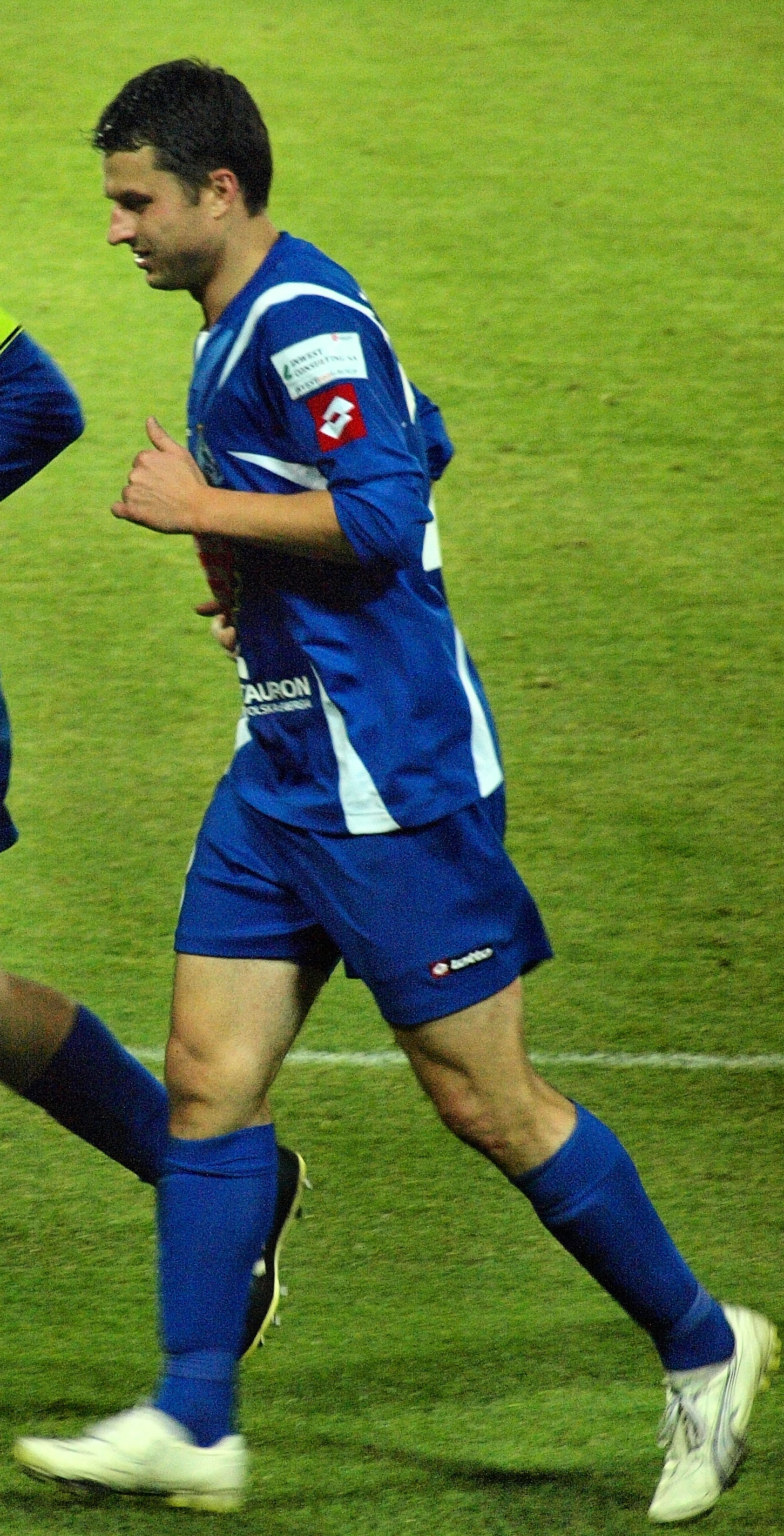 Andrzej Niedzielan w barwach Ruchu